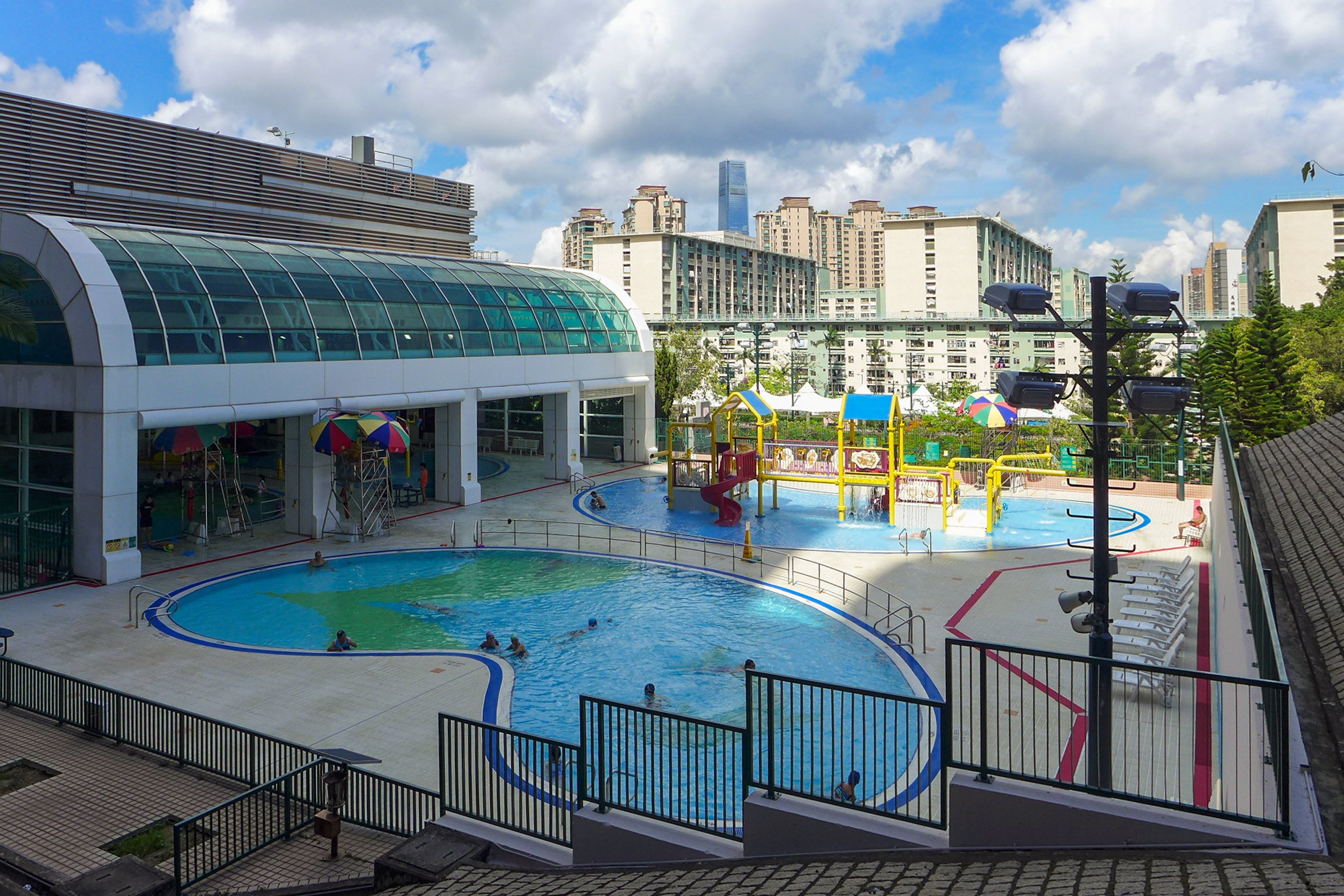 Ho Man Tin Swimming Pool